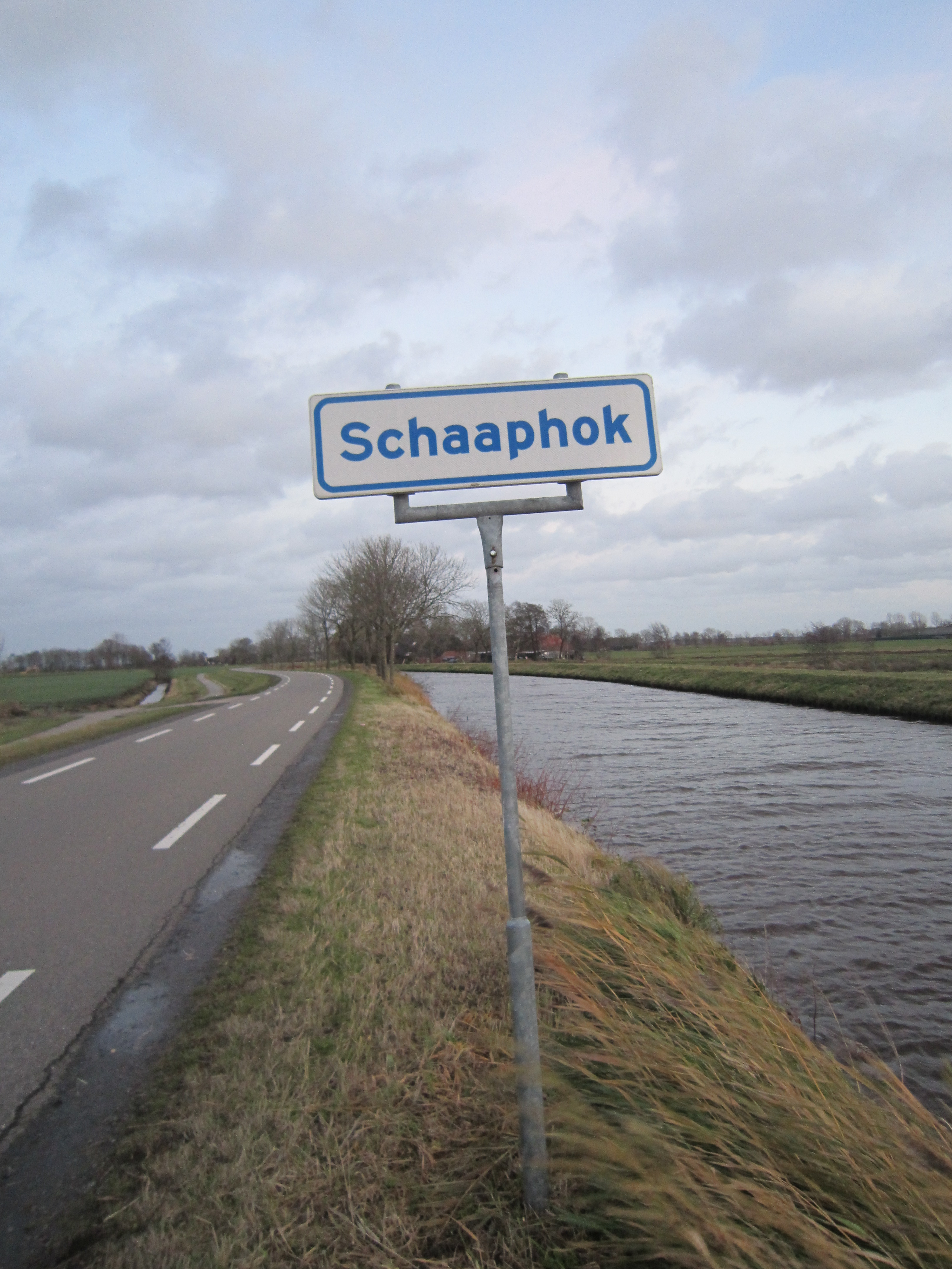 Schaaphok - Slochteren - Groningen - Nederland